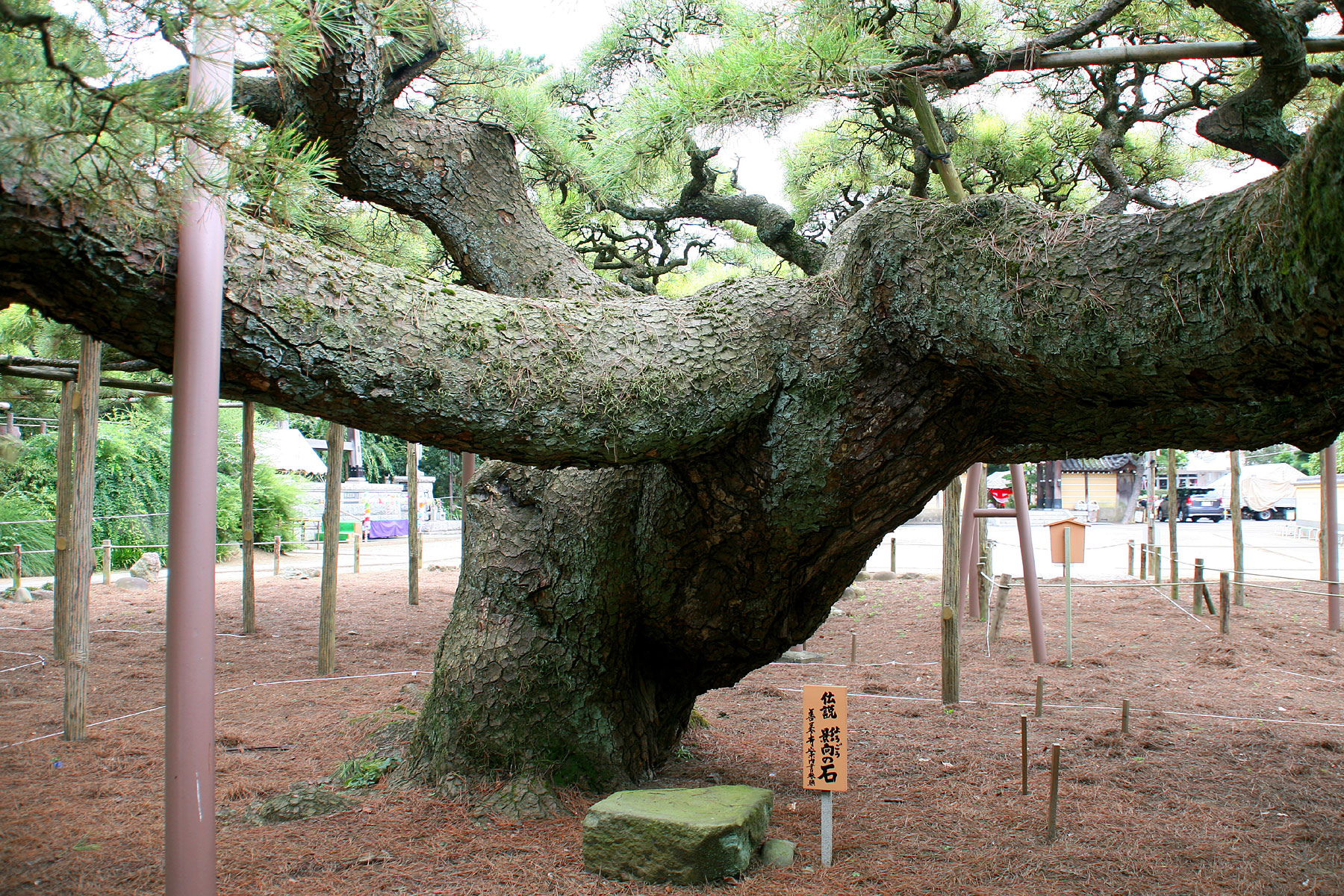 Aug. 23, 2008 江戸川区 影向のマツ (天然記念物)